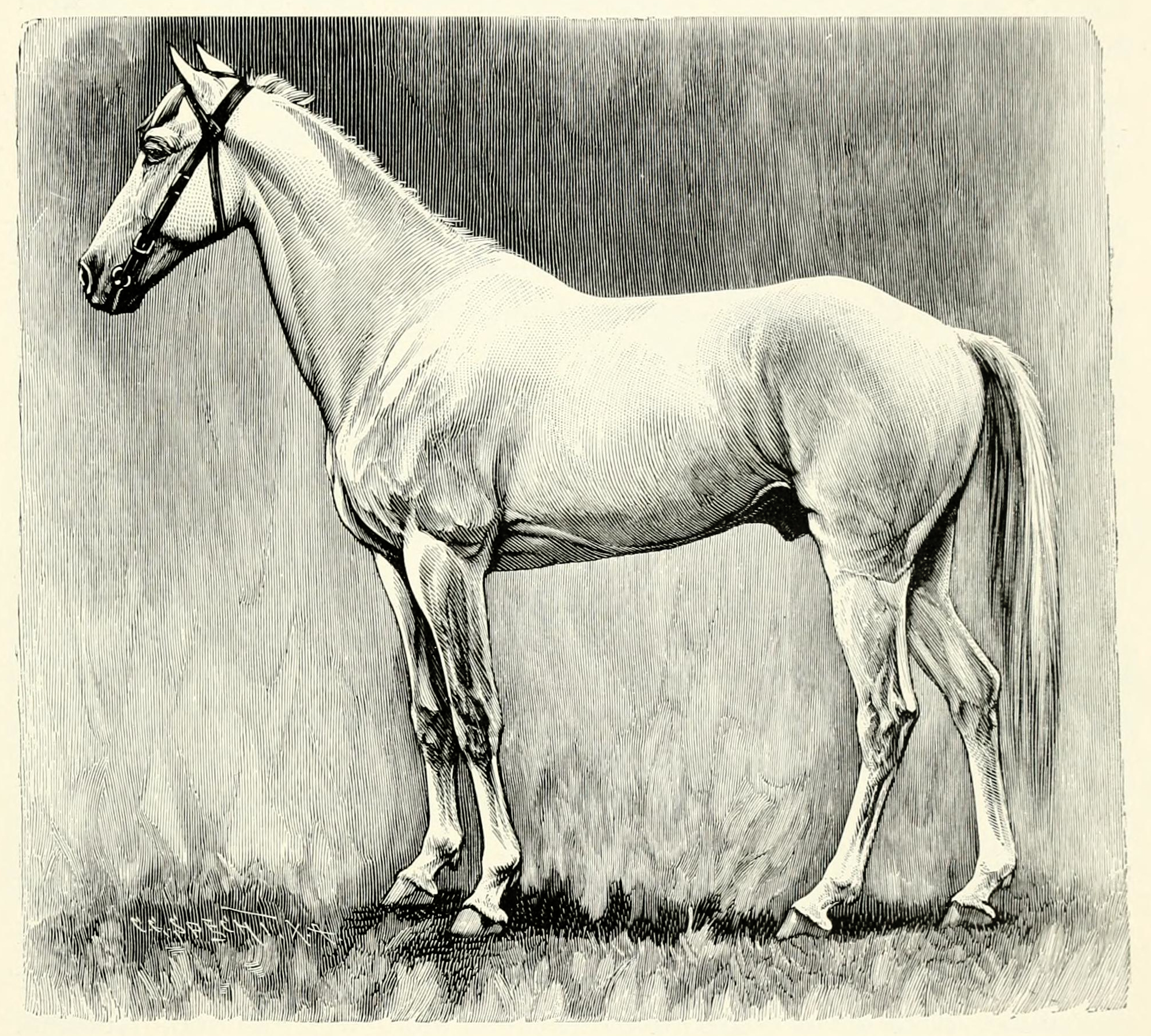 Abessinier